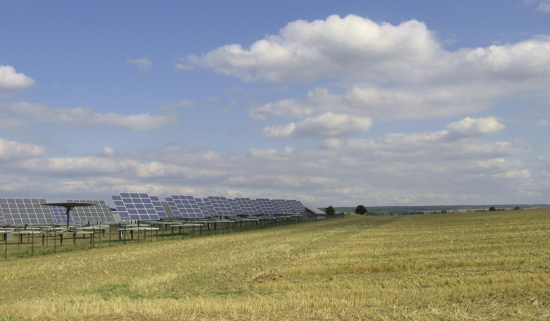 Photovoltaik-Anlage südlich von Burgtonna. Rechts: Der waldrand der Fahner Höhe.